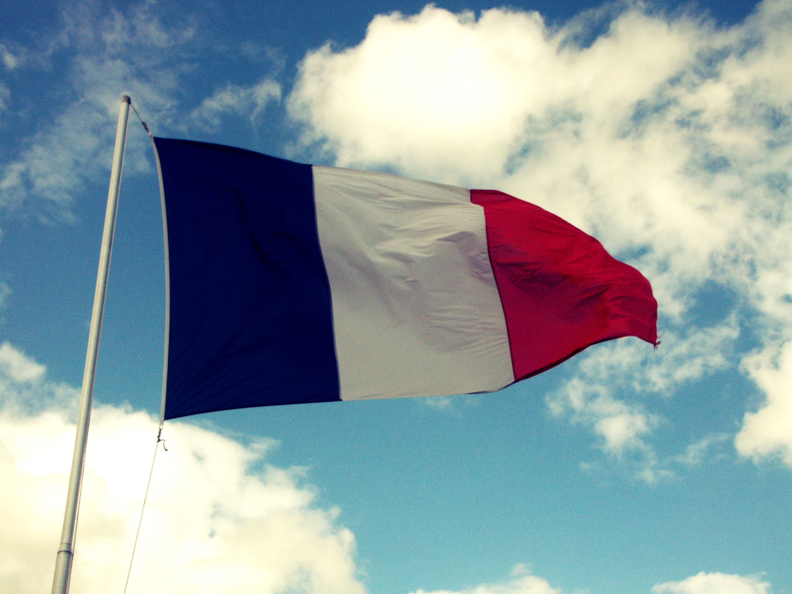 Drapeau français dans le ciel angevin